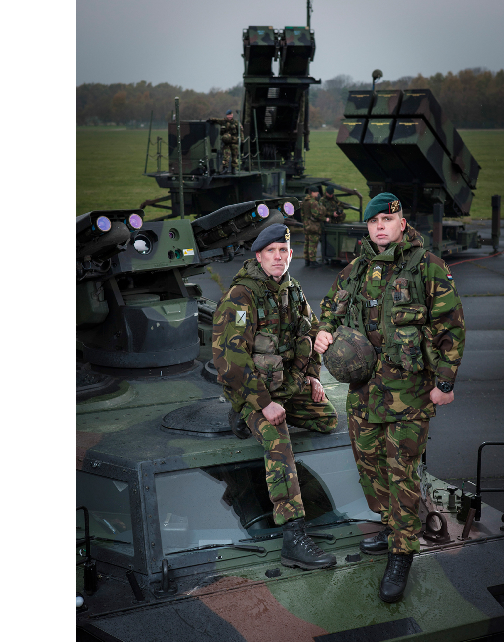 Het nieuwste materieel van de DGLC: Patriot, Nasams en Fennek Stinger Weapon Platform